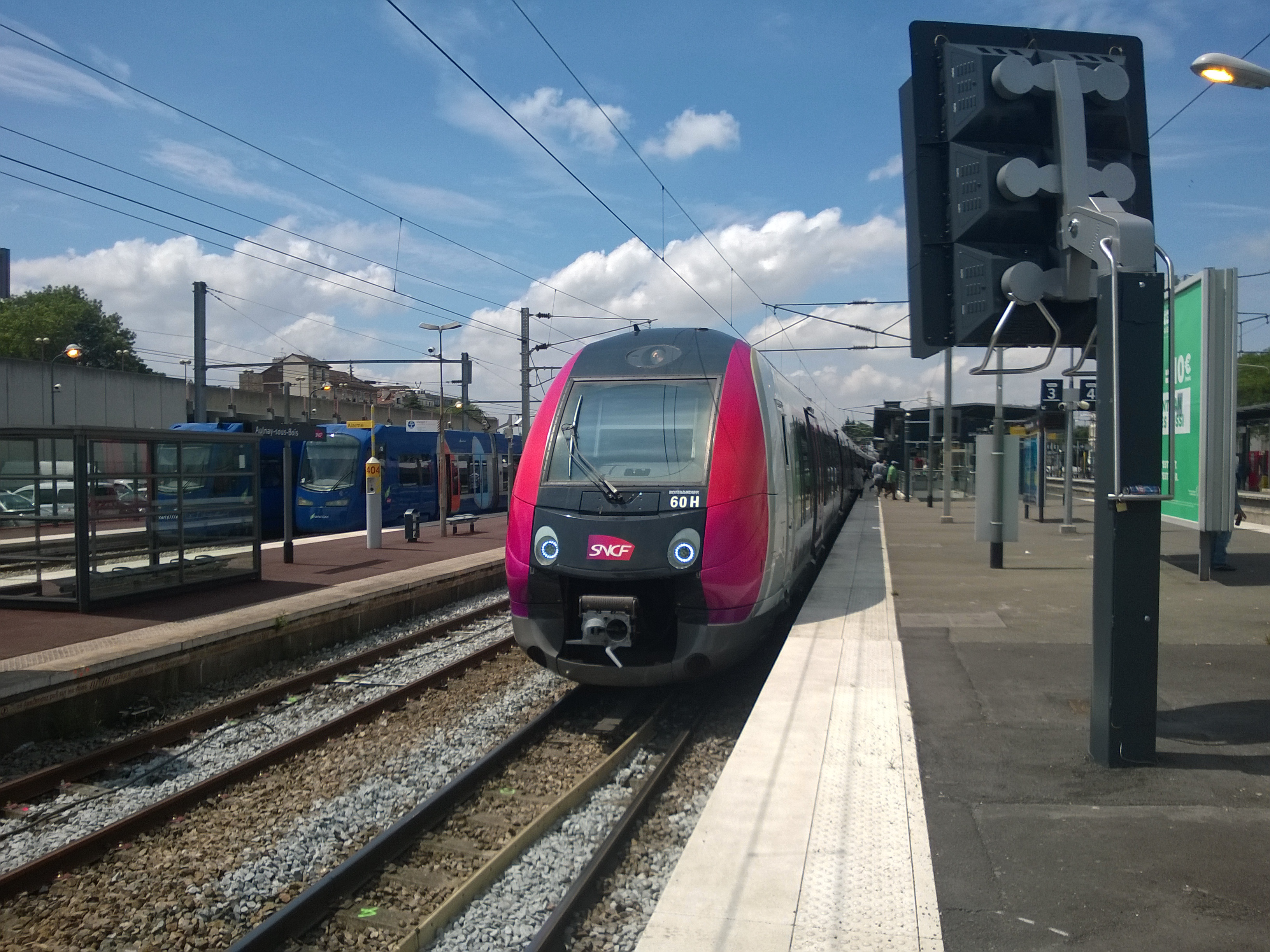 En gare d'Aulnay-sous-Bois, une Z 50000 pour Crépy-en-Valois, département de la Seine-Saint-Denis, France.